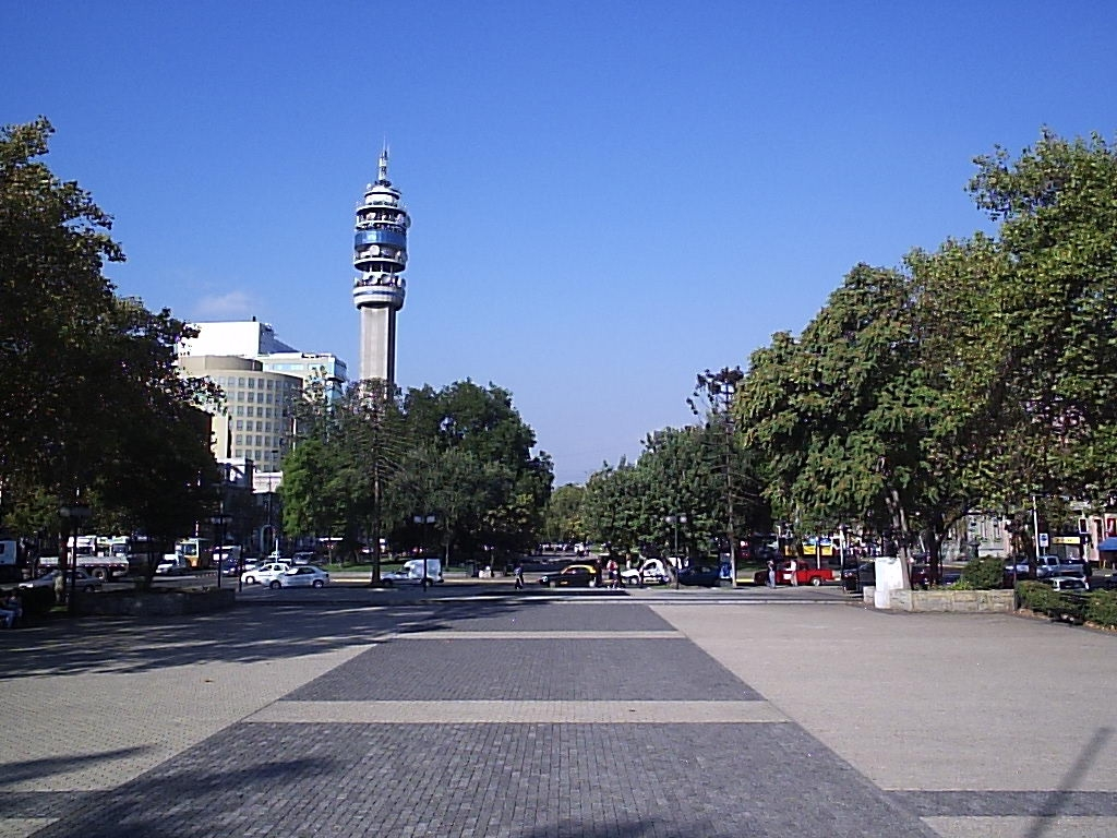 La Alameda, Santiago de Chile. Fotografía tomada con una cámara digital Olympus camedia D-395 de 3.2 megapixeles